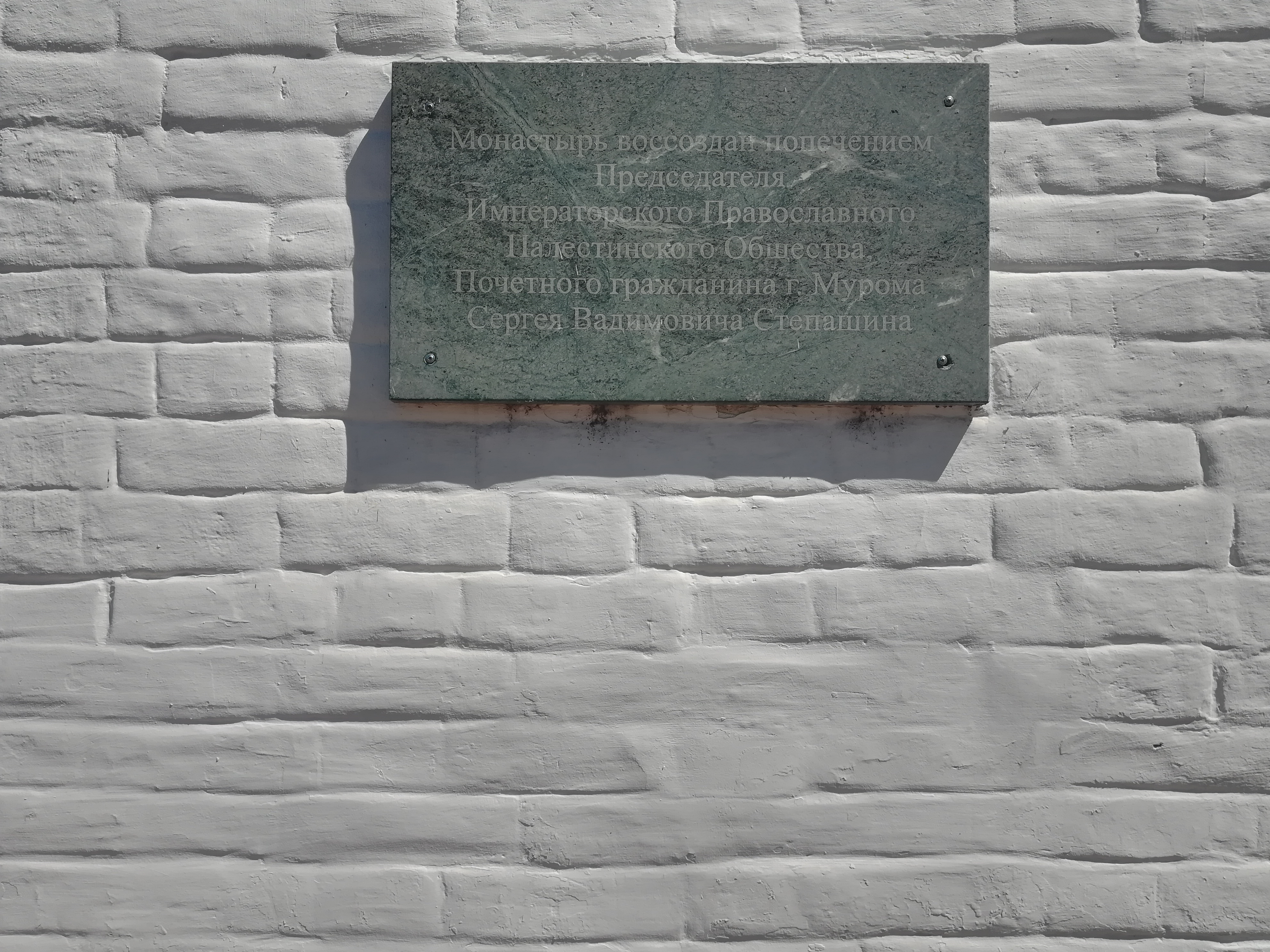 Муром